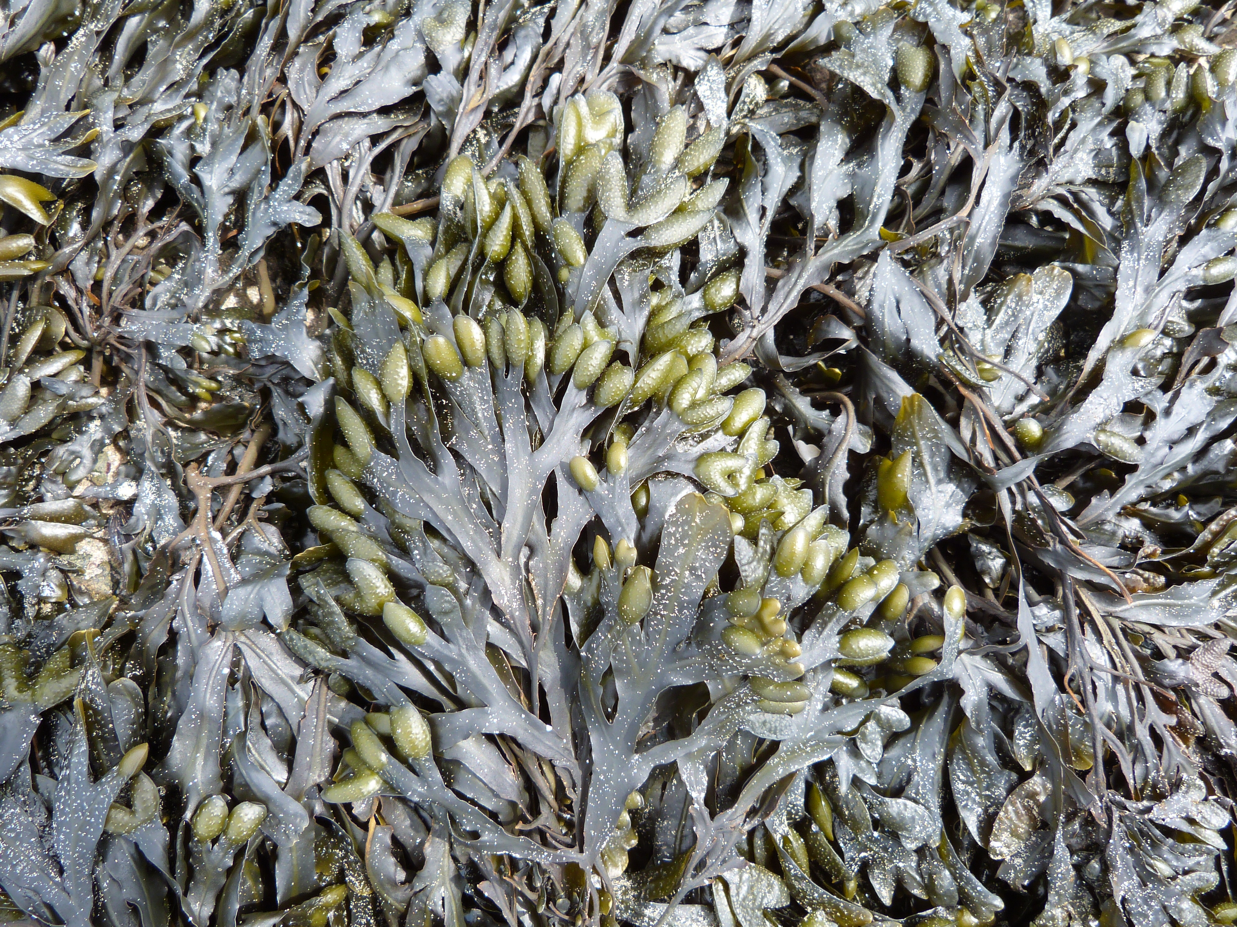 Fucus vésiculeux sur la plage de sable fin de La Cotentin à Planguenoual (Côtes-d'Armor)